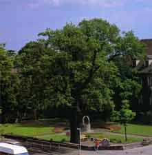 Luthereiche am Elstertor in der Lutherstadt Wittenberg, Deutschland. Der Brunnen ist von Wilhelm Rex